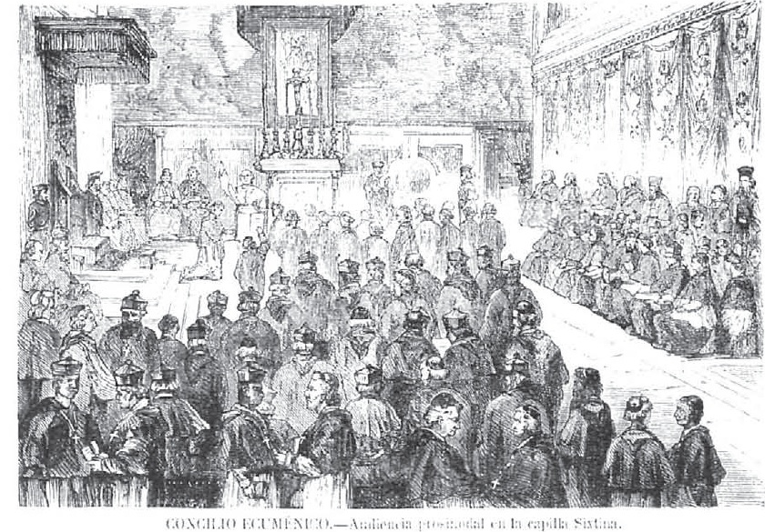 Concilio ecuménico Vatican I. Audiencia prosinodal en la capilla sixtina. Primera Sesión: celebrada el 8 de diciembre de 1869 con el Decreto de apertura del concilio.